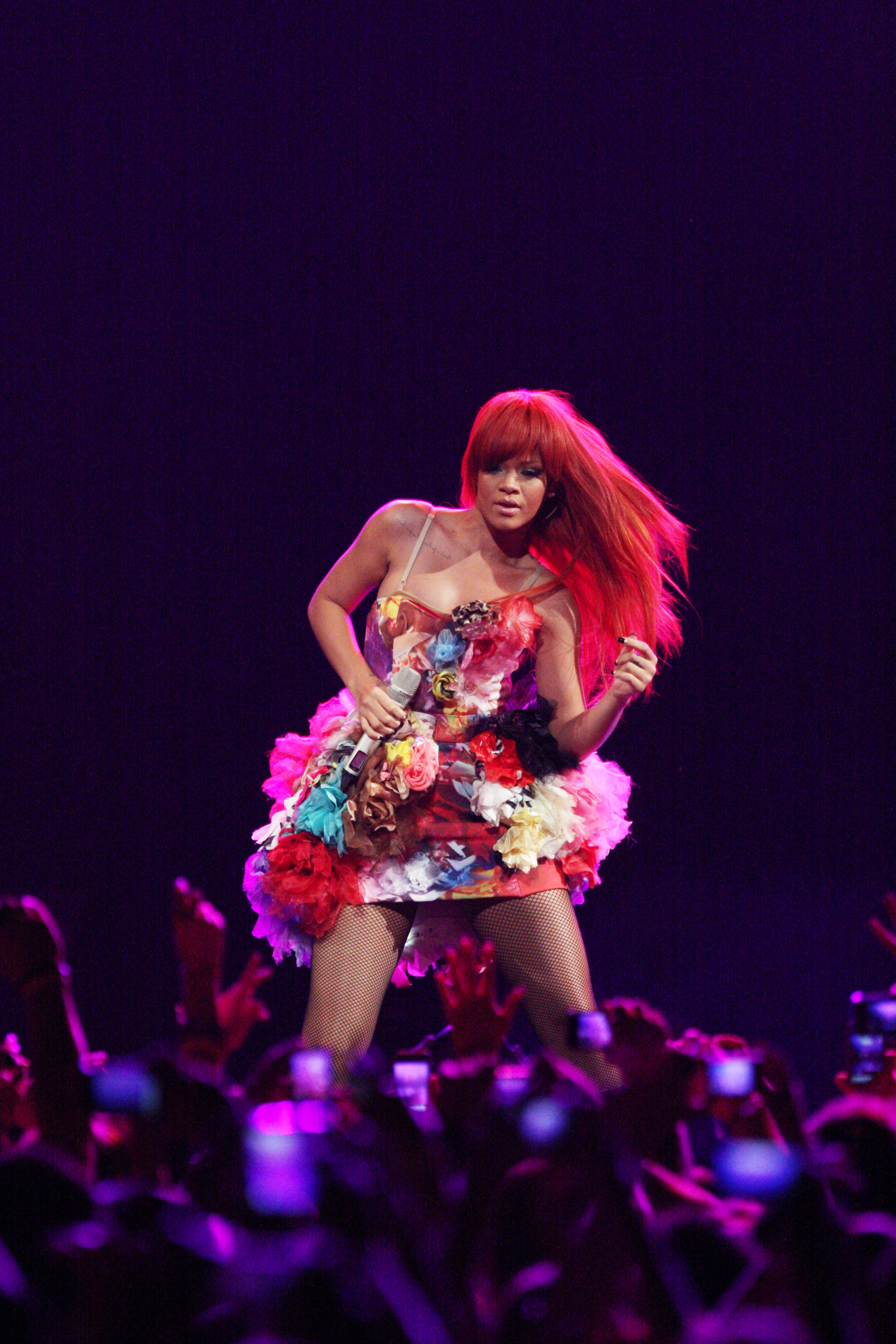 Rihanna